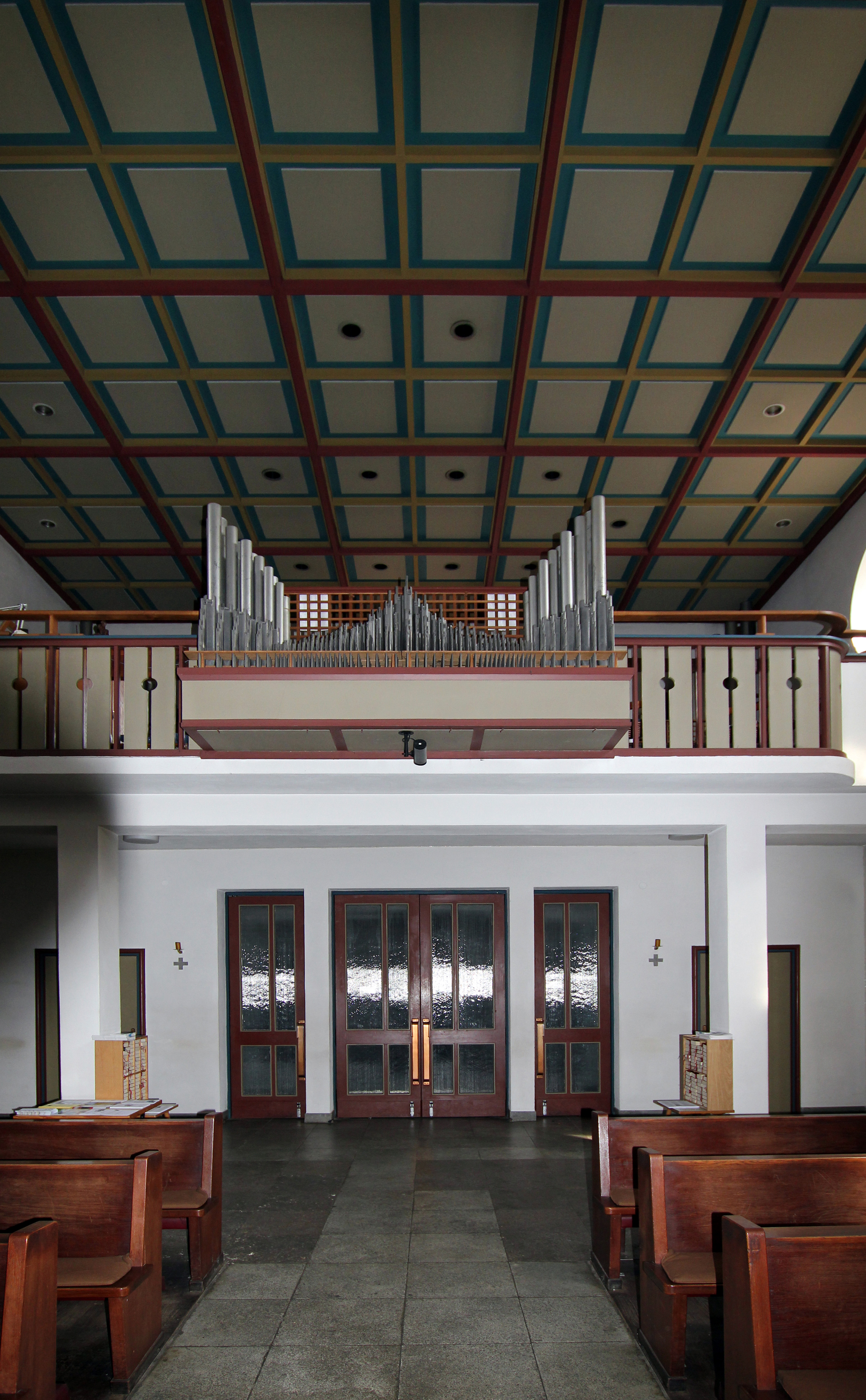 Erftstadt-Liblar